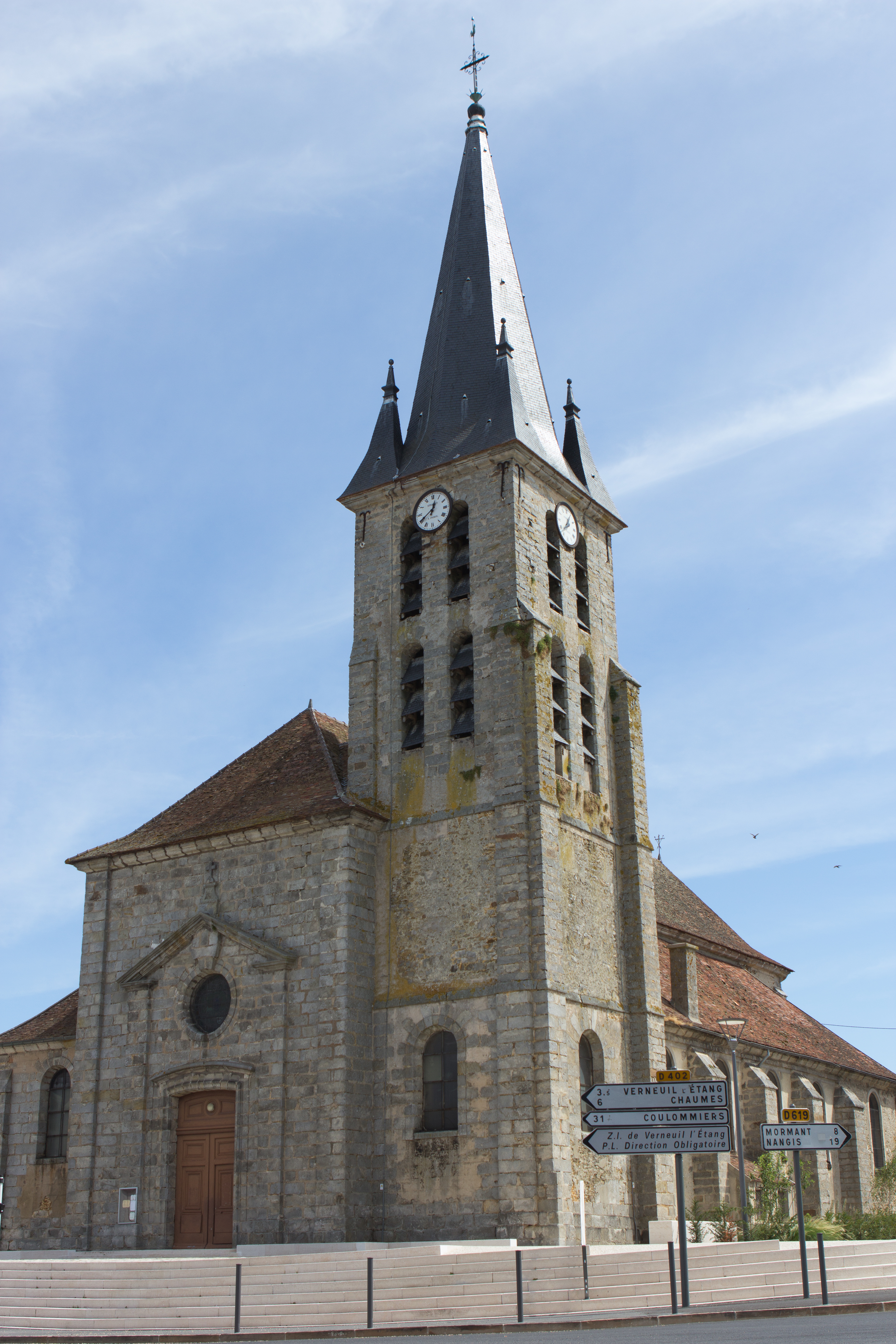 Église de Guignes / Guignes, Seine-et-Marne, France